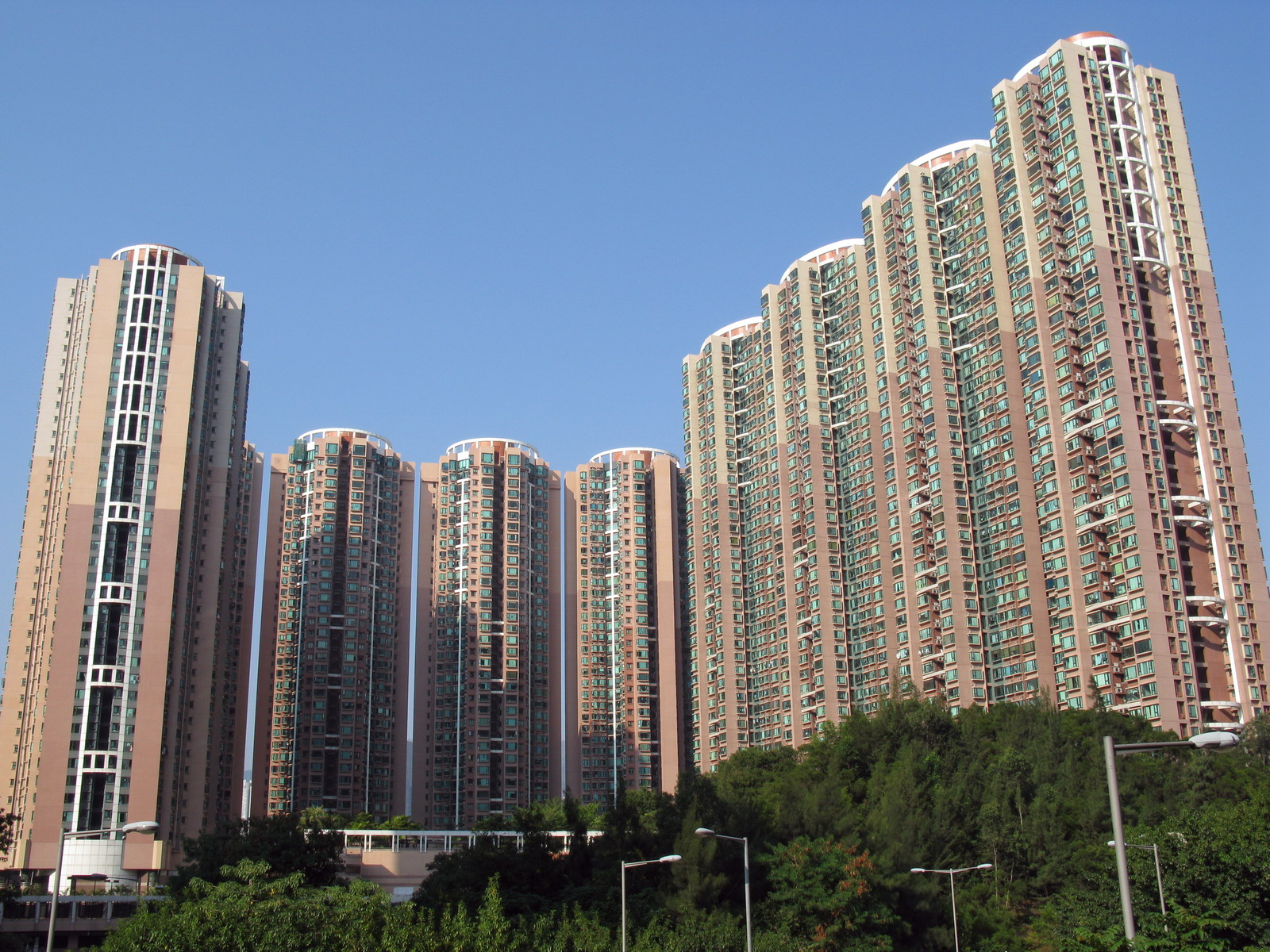 青衣-灝景灣 Villa Esplanada, Tsing Yi